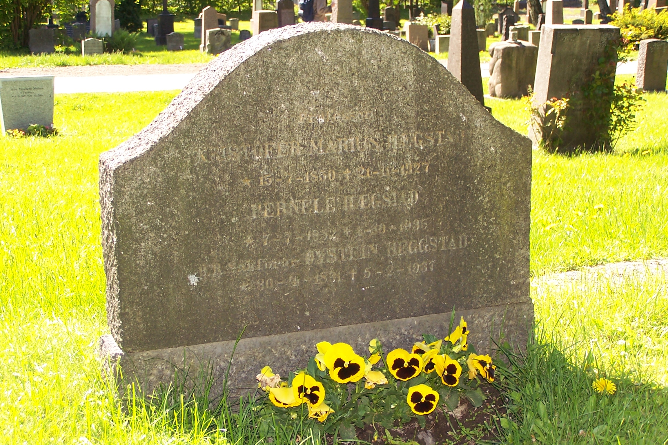 Tomb of Kristofer Marius Hægstad at Vår Frelsers gravlund, Oslo